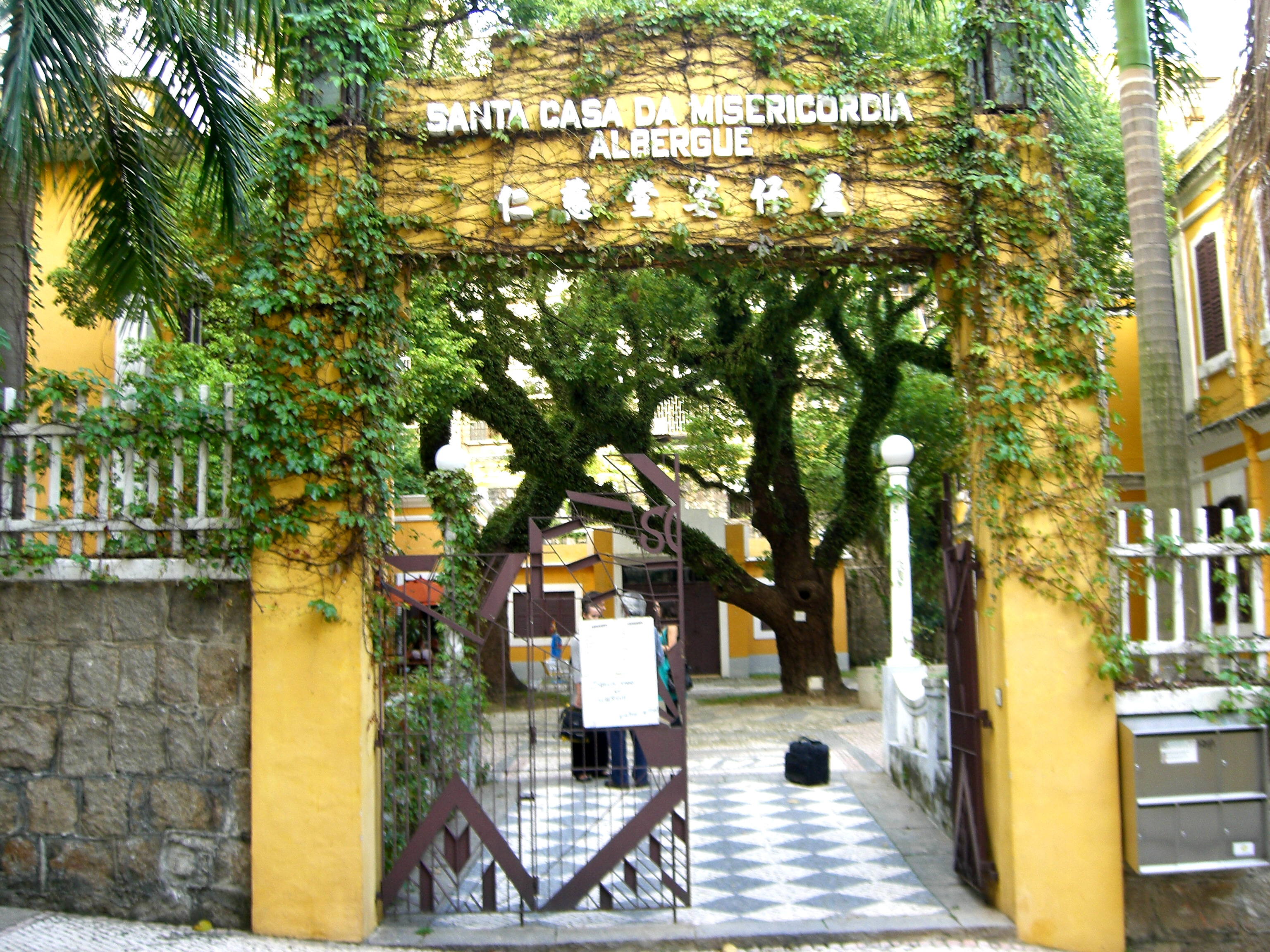 Santa Casa da Misericorcia Albergue